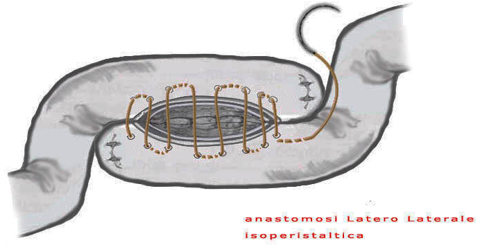 Sutura intestinale con abboccamento in senso peristaltico dei due monconi